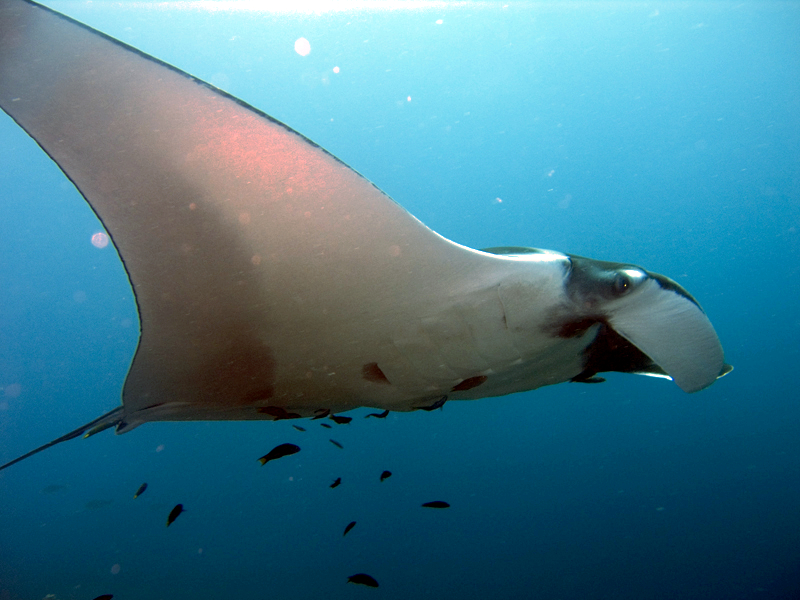 Manta Ray (Manta birostris) at Hin Daeng, Thailand.